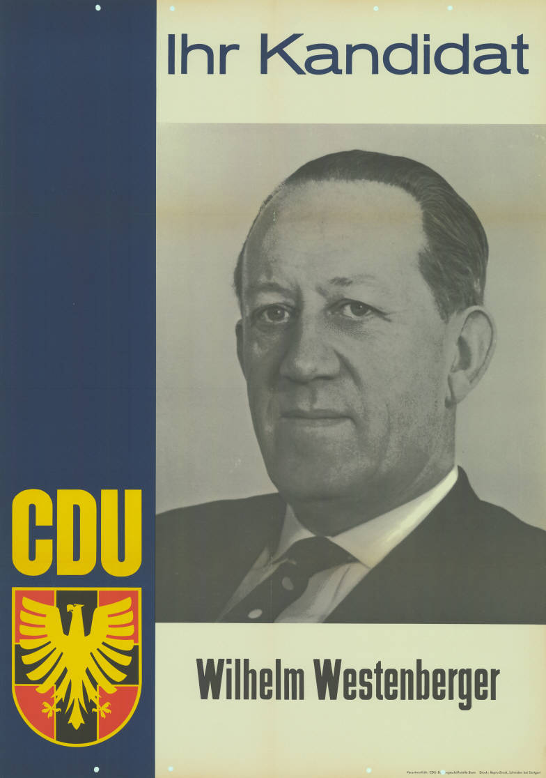 Ihr Kandidat CDU Wilhelm Westenberger Abbildung: Porträtfoto Kommentar: Rückseitig rot beschriftet. Plakatart: Kandidaten-/Personenplakat mit Porträt Auftraggeber: Verantw.: CDU-Bundesgeschäftsstelle Bonn Drucker_Druckart_Druckort: Repro-Druck, Schmiden bei Stuttgart Objekt-Signatur: 10-010 : 221 Bestand: Landtagswahlplakate Rheinland-Pfalz (10-010) GliederungBestand10-18: Landtagswahlplakate Rheinland-Pfalz (10-010) » CDU Lizenz: KAS/ACDP 10-010 : 221 CC-BY-SA 3.0 DE